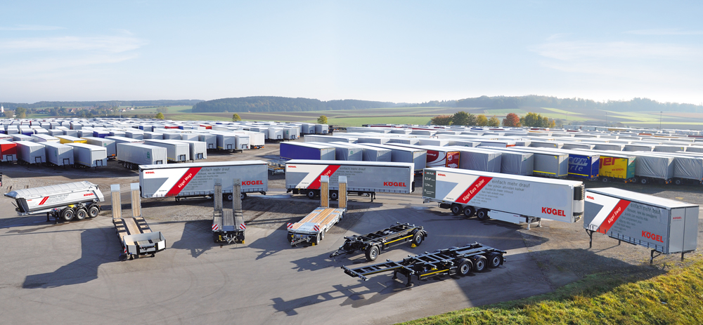 Kögel Produktportfolio